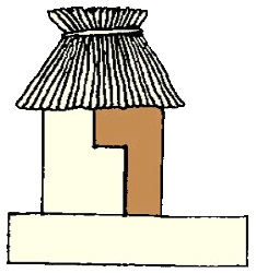 Glifo de Jacala, Hidalgo